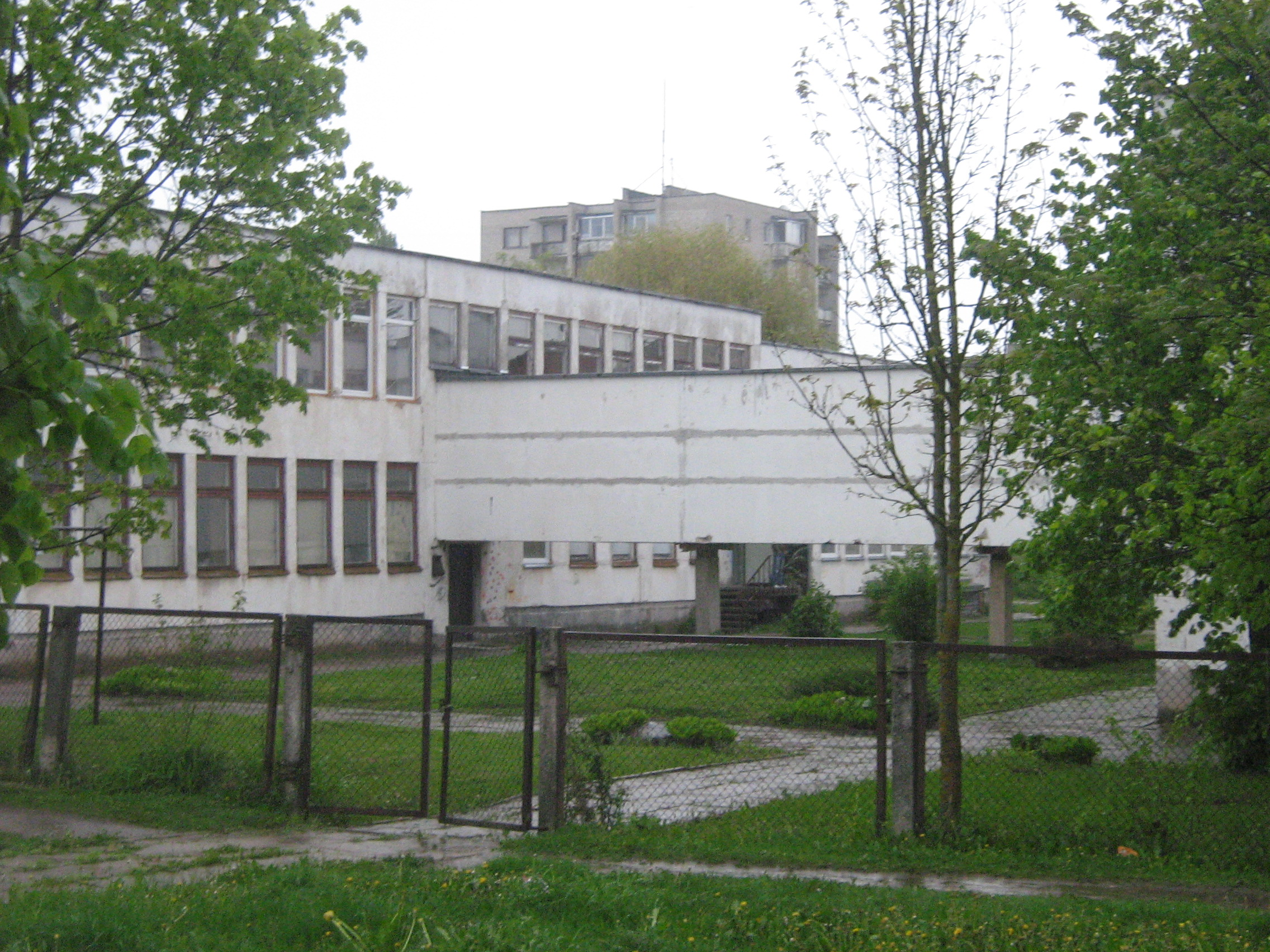 Darželis "Gandriukas" Jonavoje.